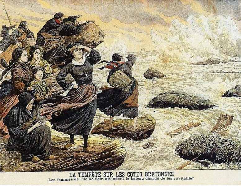 Femmes de l'Île de Sein attendant le bateau chargé de les ravitailler lors d'une tempête de longue durée (dessin, Le Petit Journal, 1906)